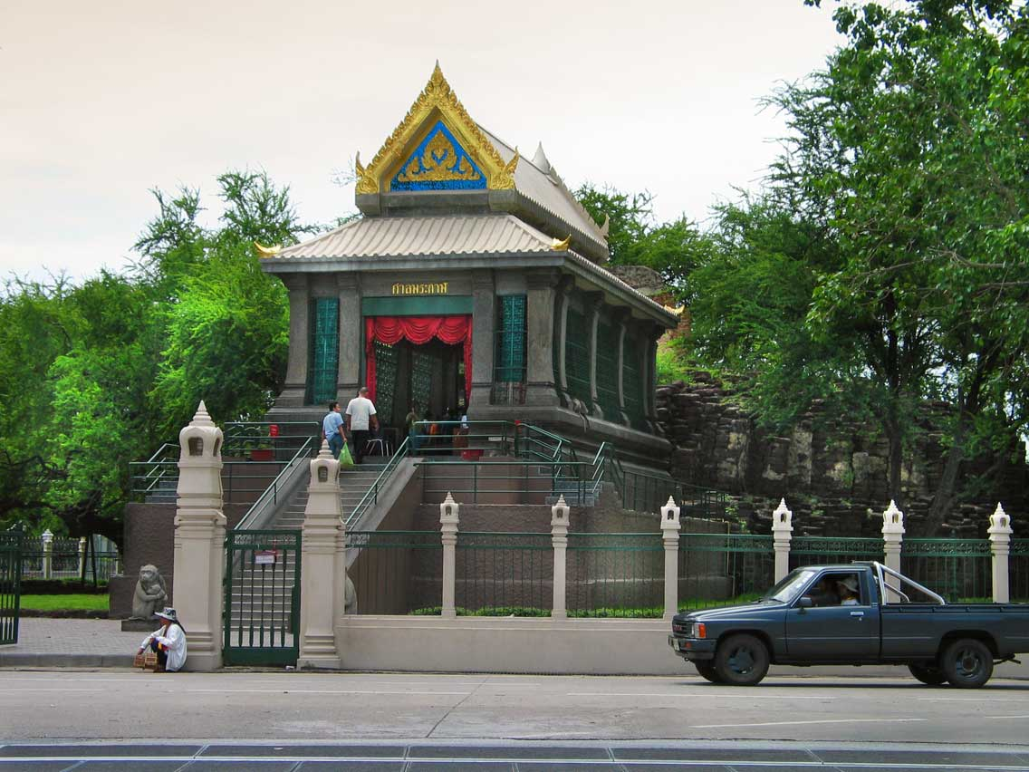 San Phra Kan shrine, Lopburi, Thailand